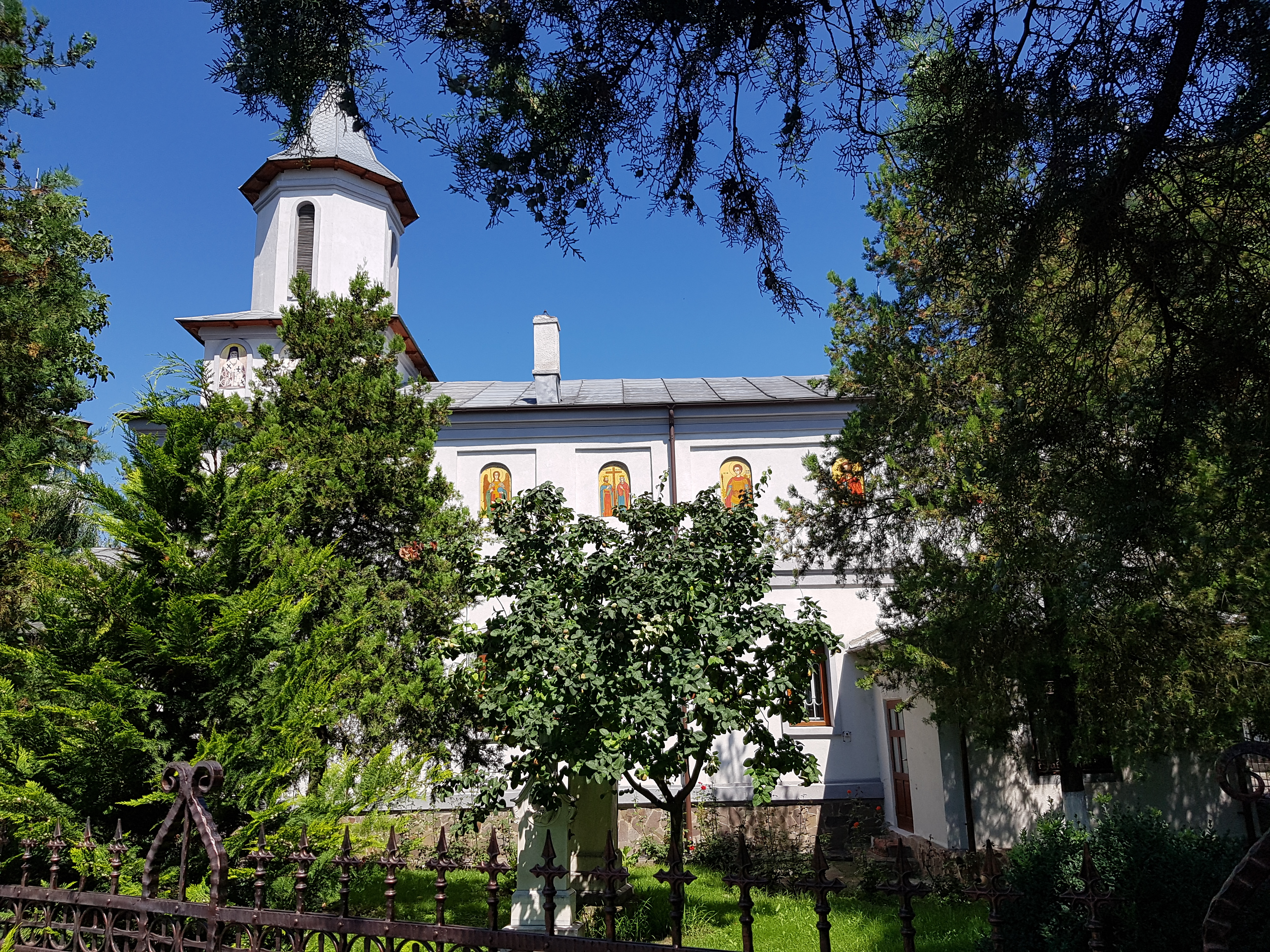 Biserica „Sf. Nicolae” - Stroe